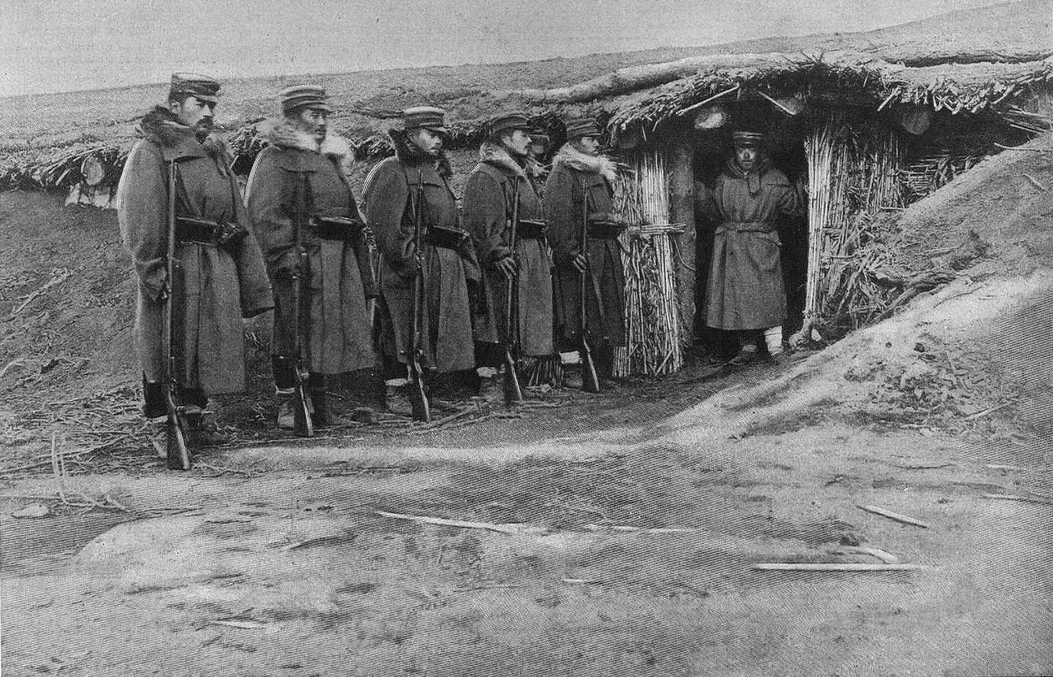 Guerra ruso-japonesa, entrada del alojamiento del general Asaki, delante de Sandepú, de fotografía de Collier's Weekly, en la revista española La Ilustración Artística.